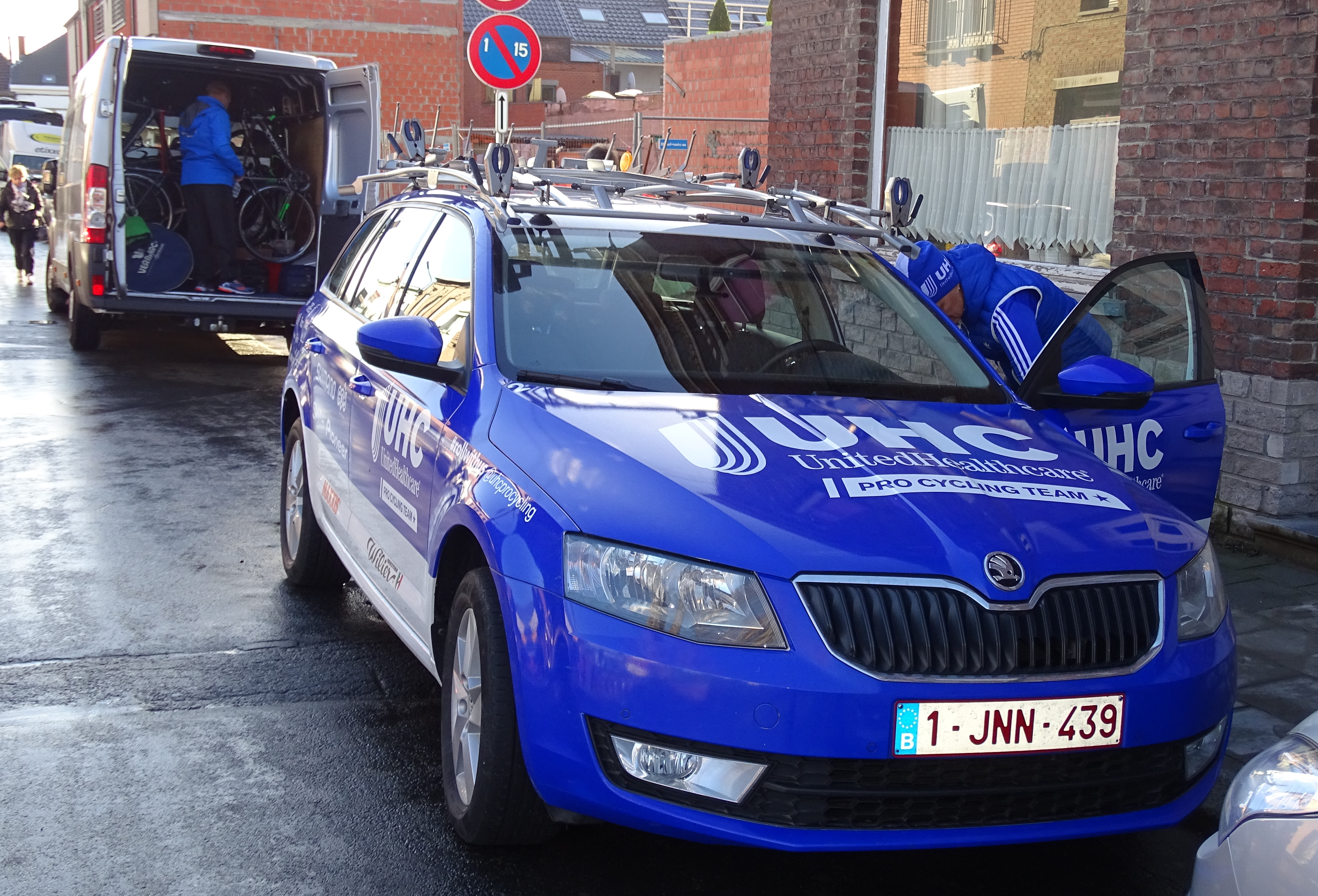 Reportage réalisé le mercredi 2 mars à l'occasion du départ du Samyn des Dames 2016 et du Samyn 2016 à Quaregnon, Belgique.